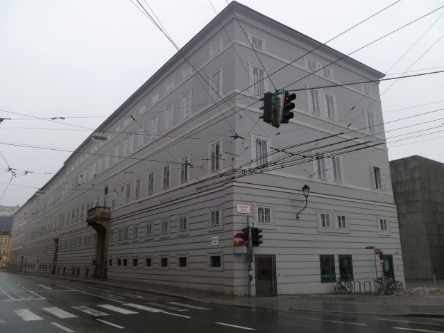 Ehem. Borromäum, Mozarteum